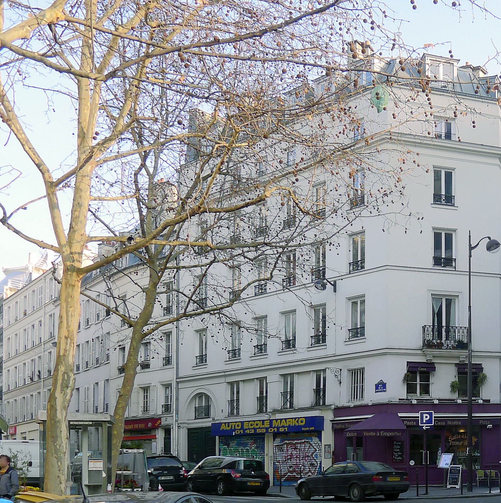 Rue de la Fontaine-au-Roi - Paris XI